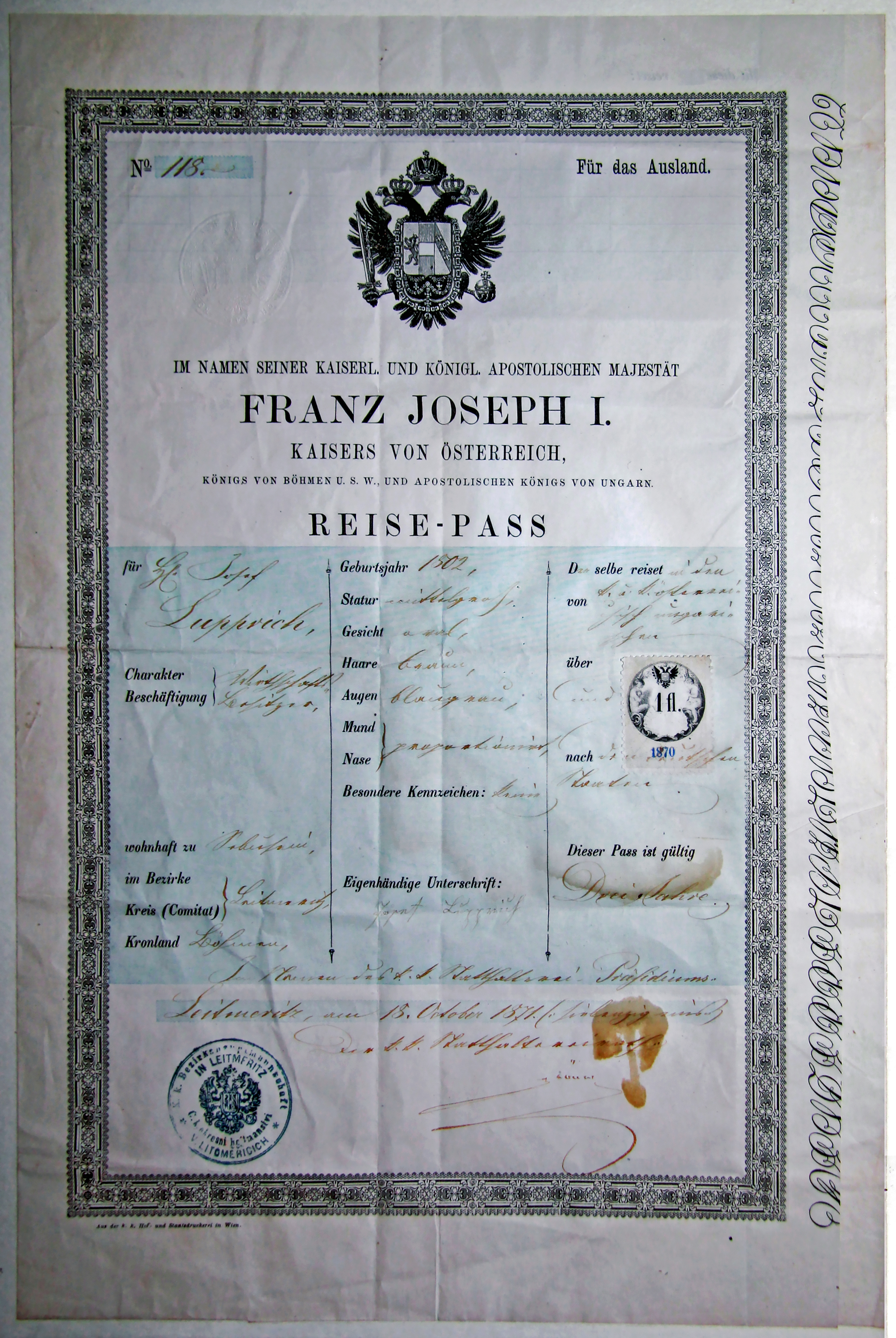 Alter Reisepass von 1871 - Ausstellungsstück im Kaiser-Franz-Josef-Museum in Baden, Niederösterreich